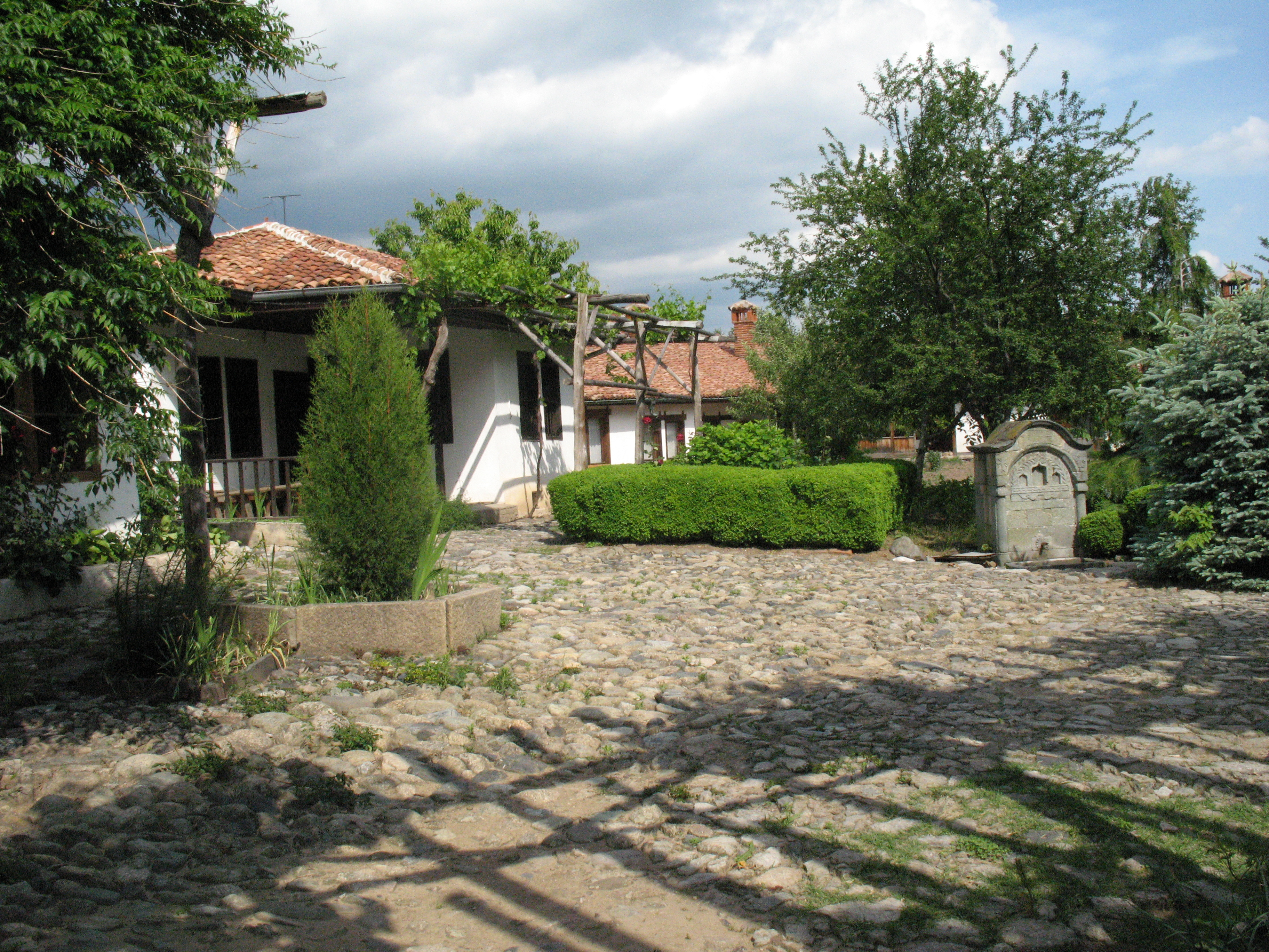 Сопот_4130